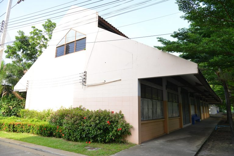 หอประชุมโรงเรียน